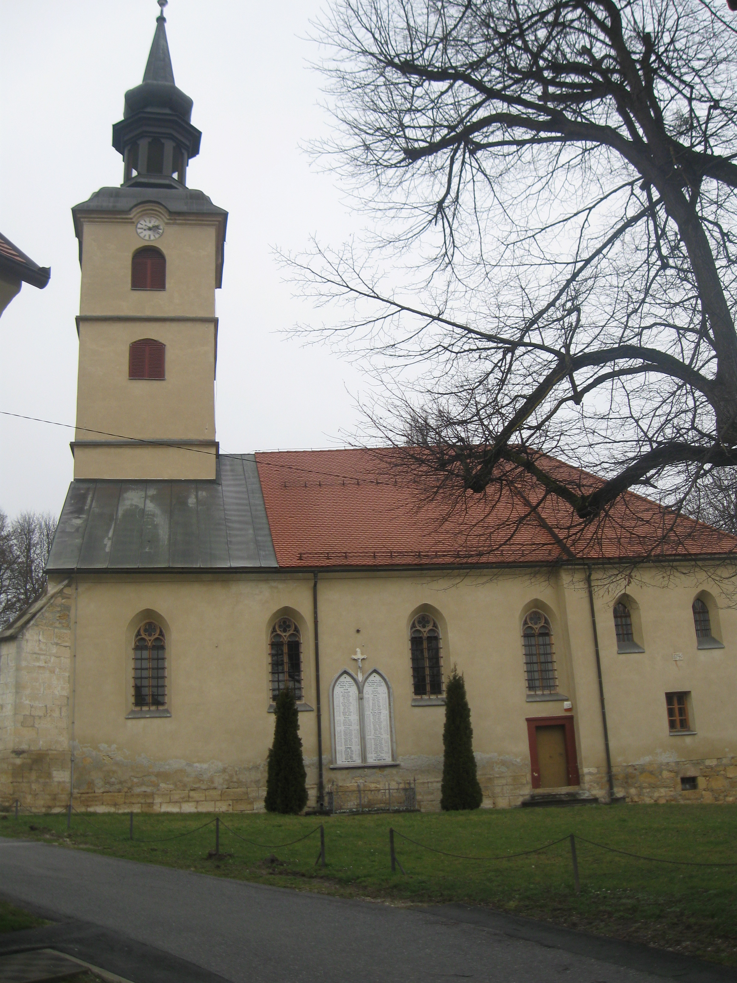 Cerkev sv. Benedikta v Benediktu v Slovenskih goricah.